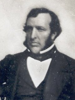 Edward Cole b1803 d1853